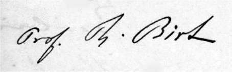 Unterschrift des Schriftstellers Theodor Birt.